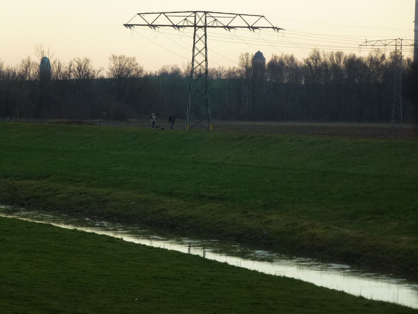 Neue Luppe und 110-kV-Freileitung bei Lützschena (Leipzig), Blick auf den Wasserturm und den Turm der ehem. Ludwig Hupfeld AG in Böhlitz-Ehrenberg